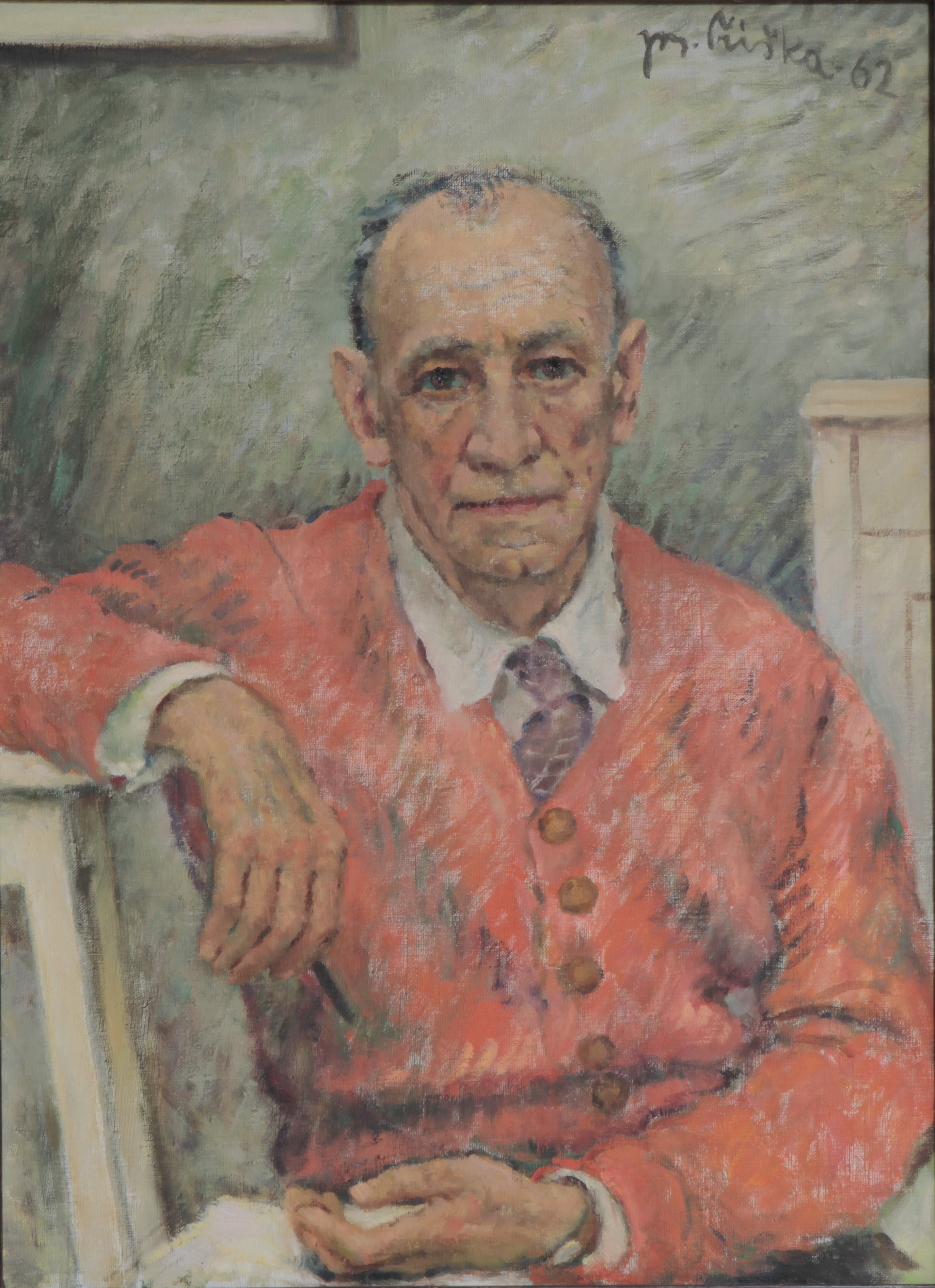 Výstavní síň s obrazy Josefa Tříšky, Muzeum Štěpánovska Trhový Štěpánov.